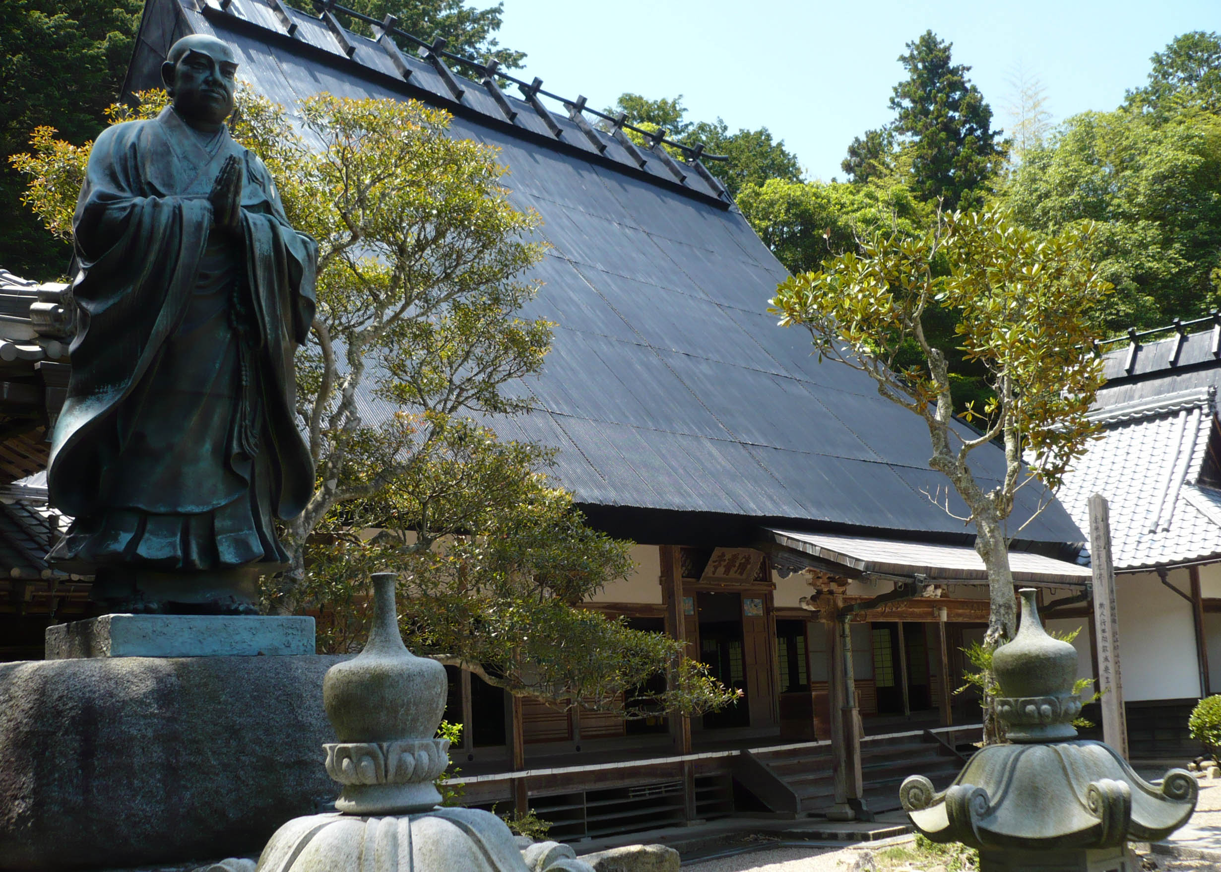 本堂